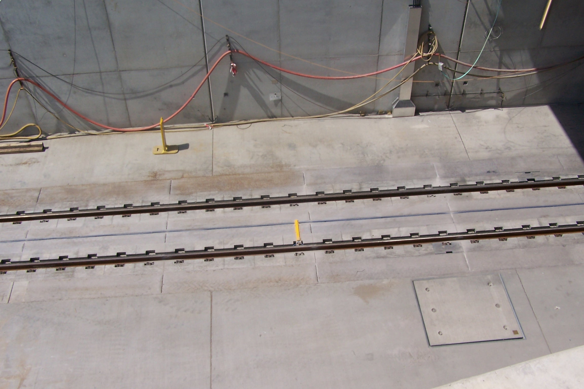 Feste Fahrbahn am Südportal des Katzenbergtunnels